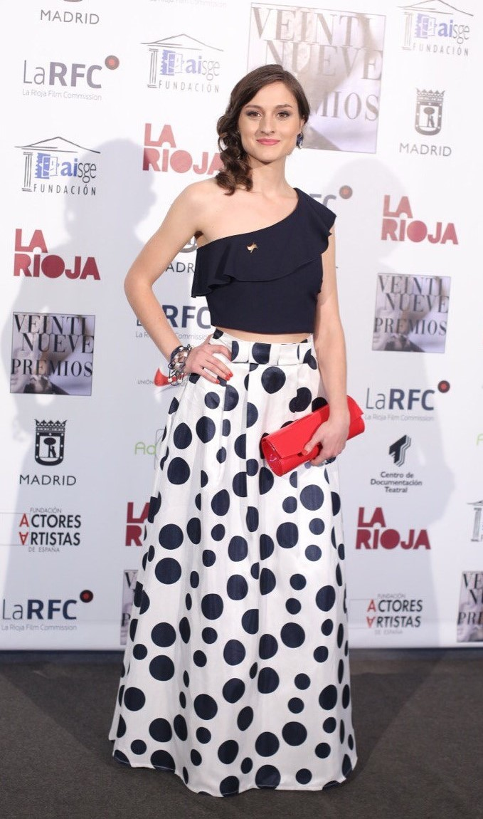 Lucía Fuengallego en los Premios de la UA (2020)